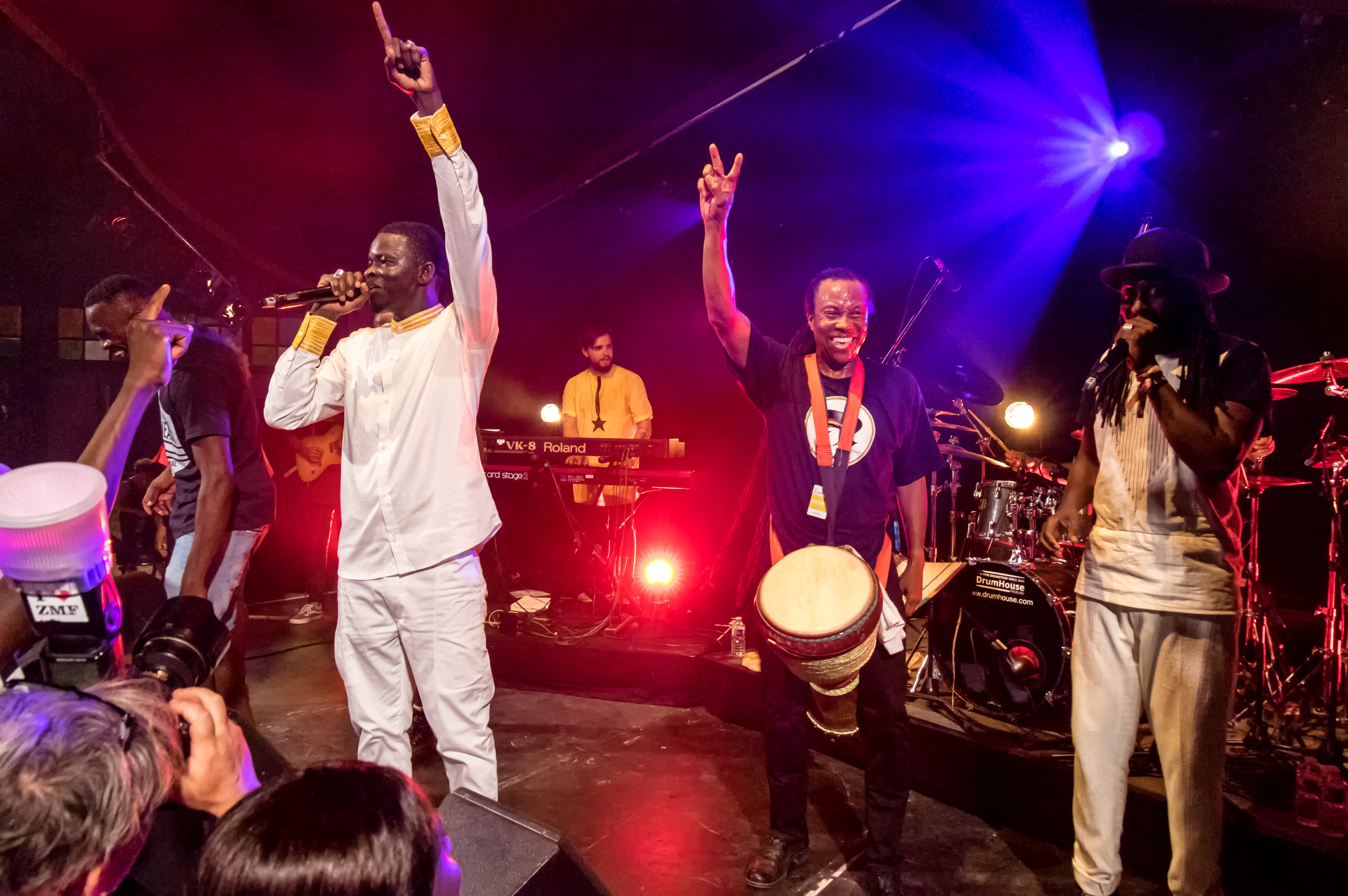 Bilder vom Zelt Musik Festival 2018 in Freiburg im Breisgau Daara J am 29.07.2018 im Spiegelzelt